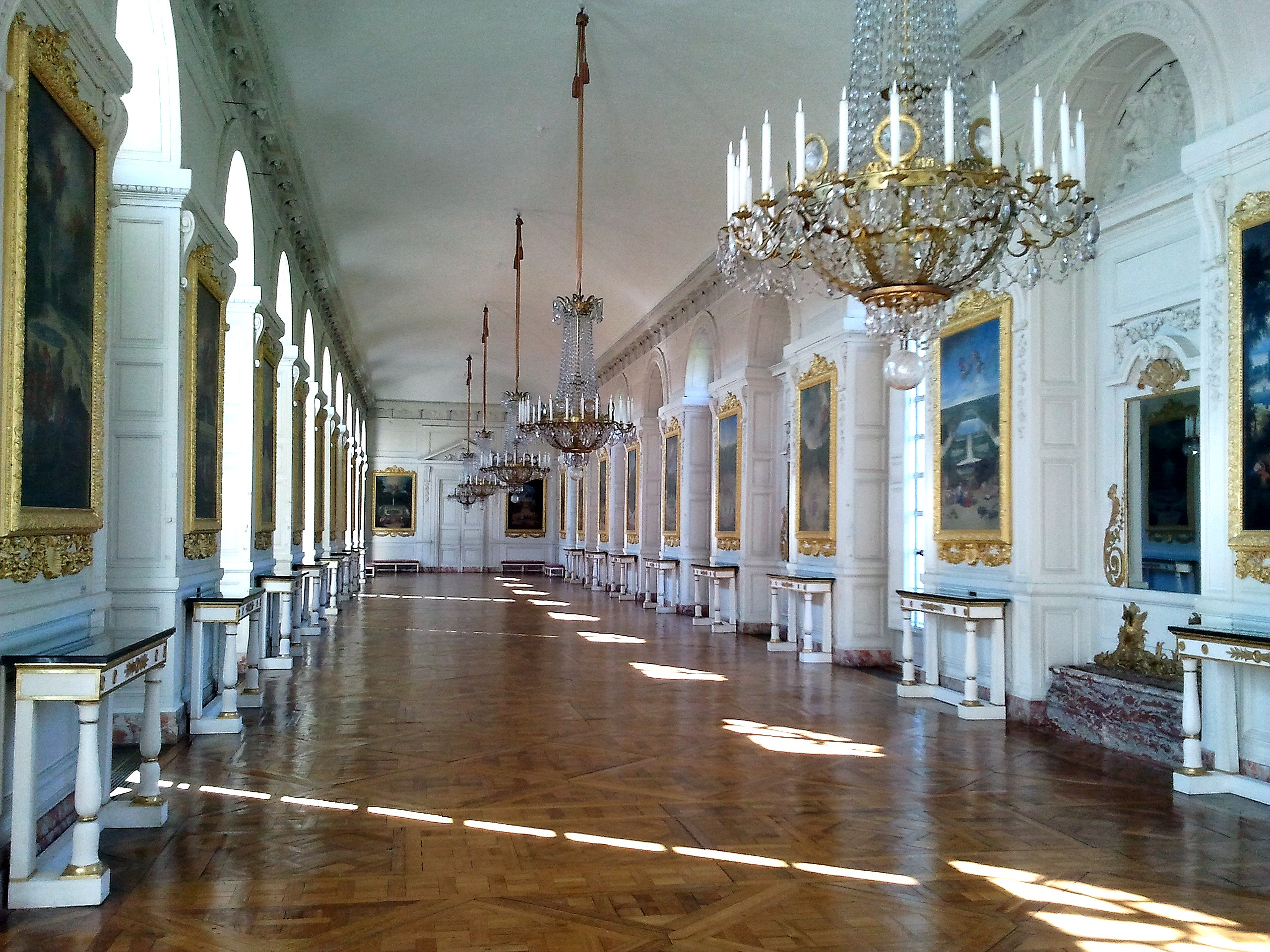 La galerie des Cotelle au Grand Trianon à Versailles